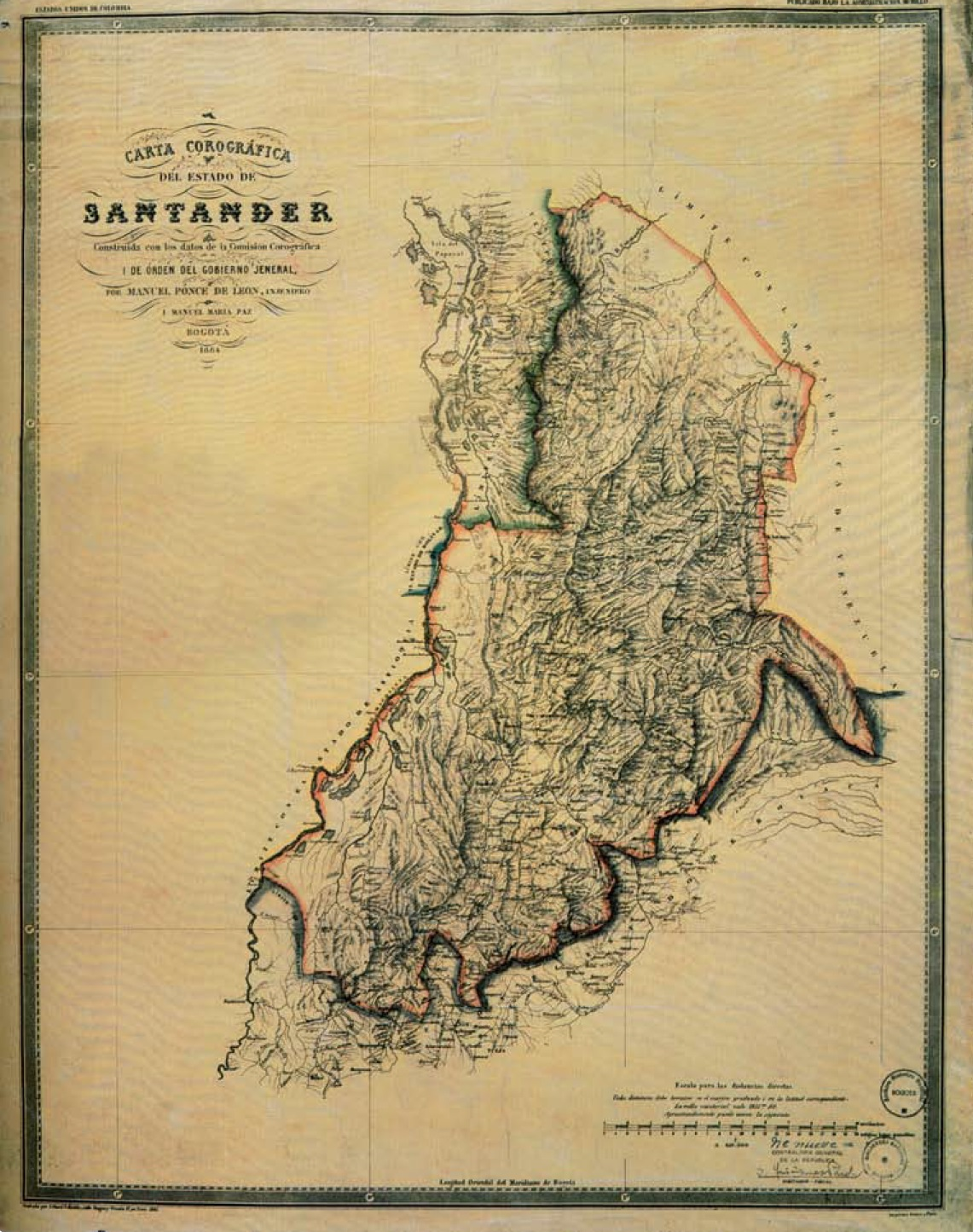 Carta Corográfica del Estado Soberano de Santander. Tomado del "Atlas de los Estados Unidos de Colombia, antigua Nueva Granada", 1865.